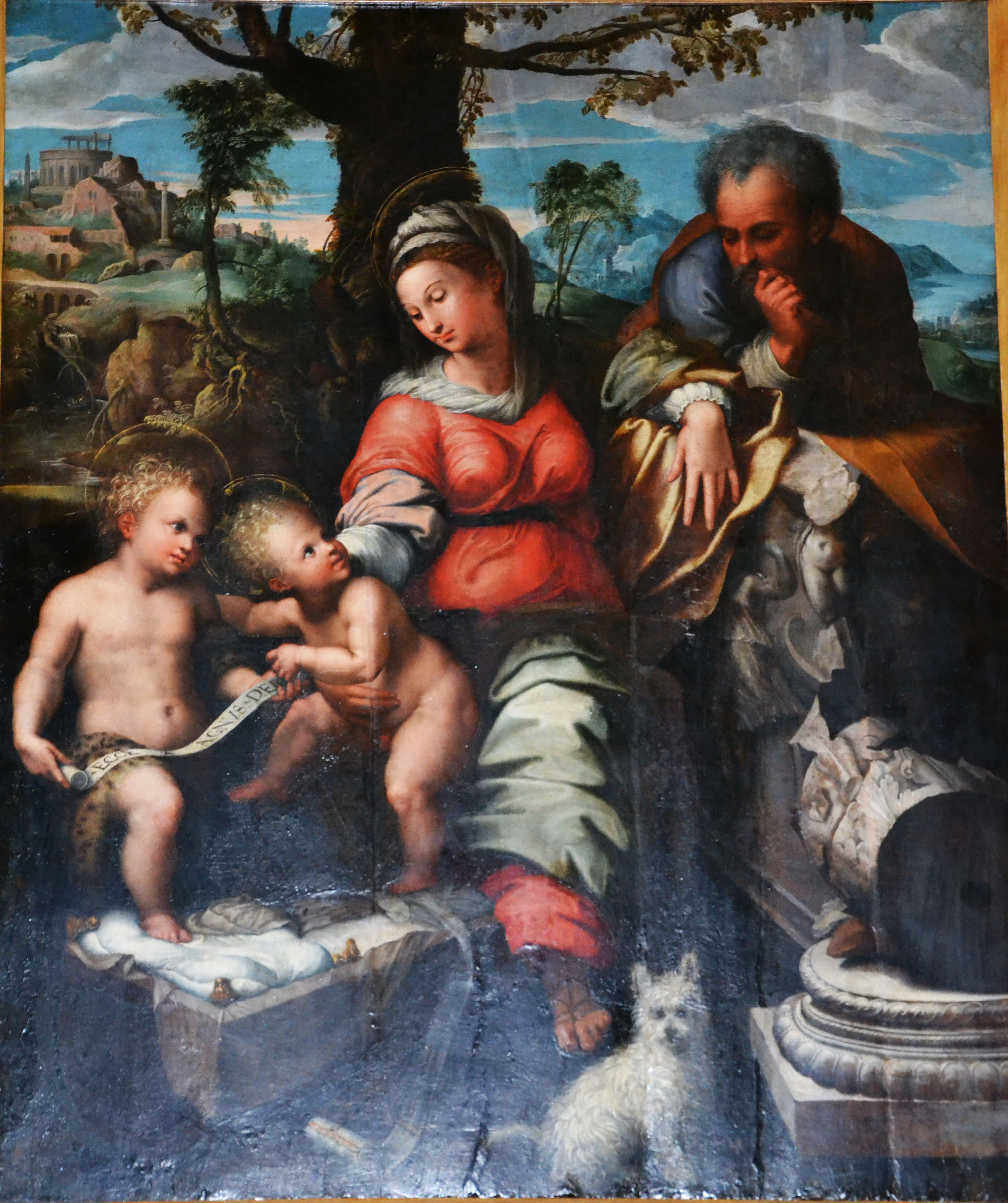 Santuario di Nostra Signora Incoronata (Coronata, Genova)